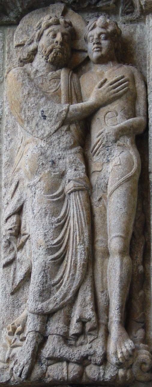 self made.